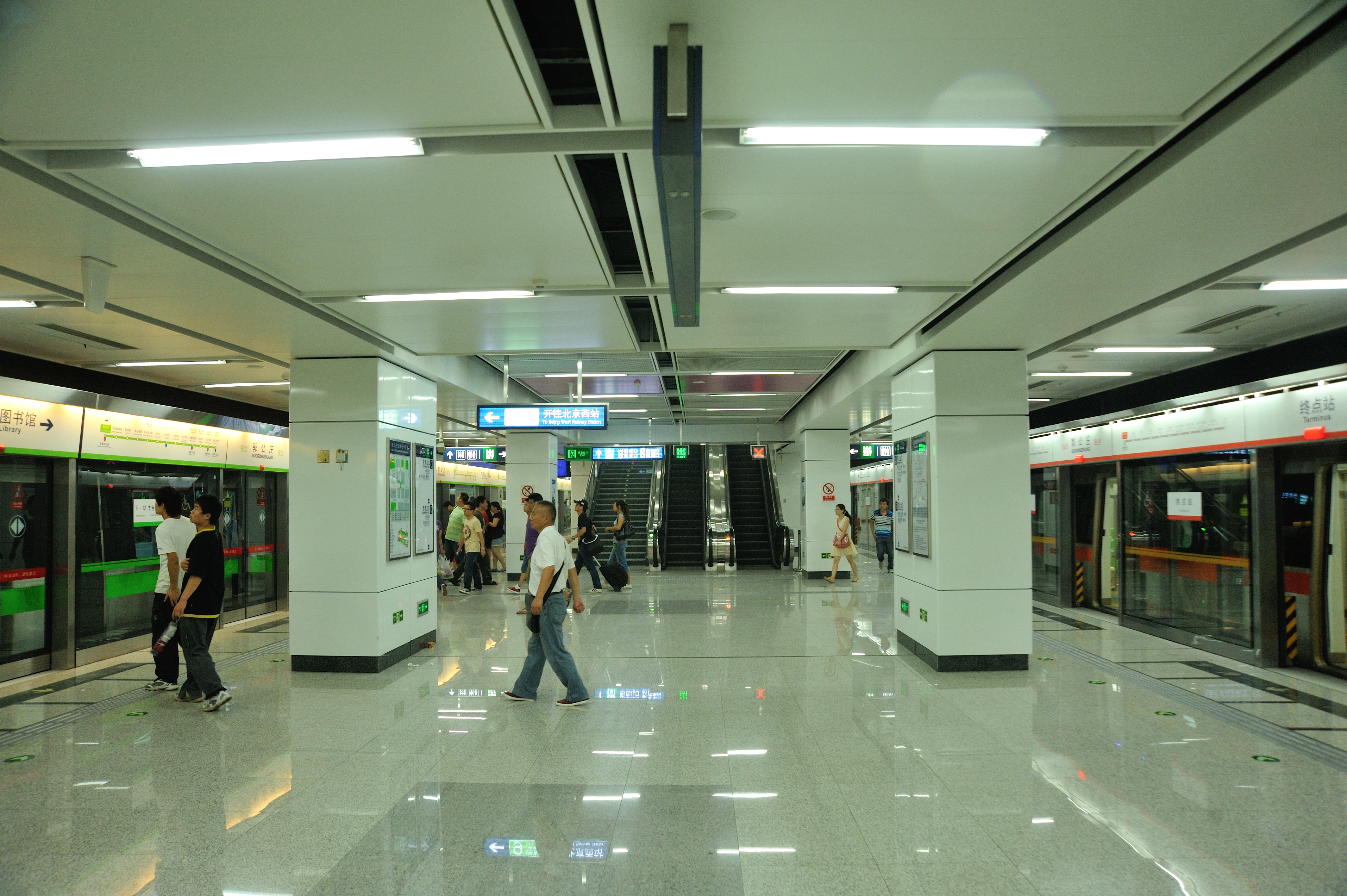 郭公庄站同台换乘